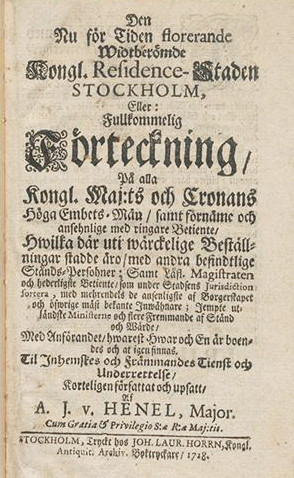 Andreas Joachim von Henels adressbok: Den nu för tiden florerande widtberömde kongl. Residencestaden Stockholm 1728